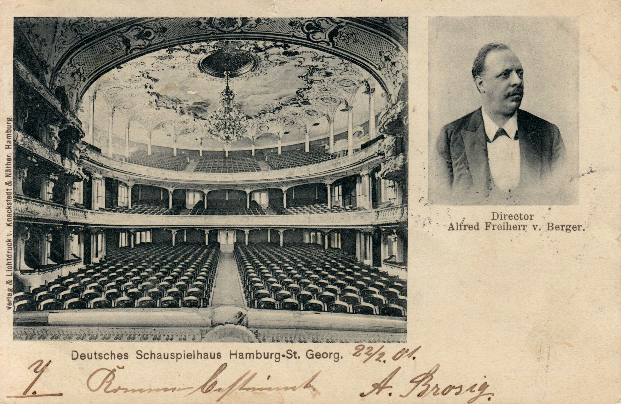 Ansichtskarte Hamburg, Deutsches Schauspielhaus, rechts: Direktor Alfred von Berger; versandt 22. Februar 1901. Verlag Knackstadt & Näther, Hamburg.